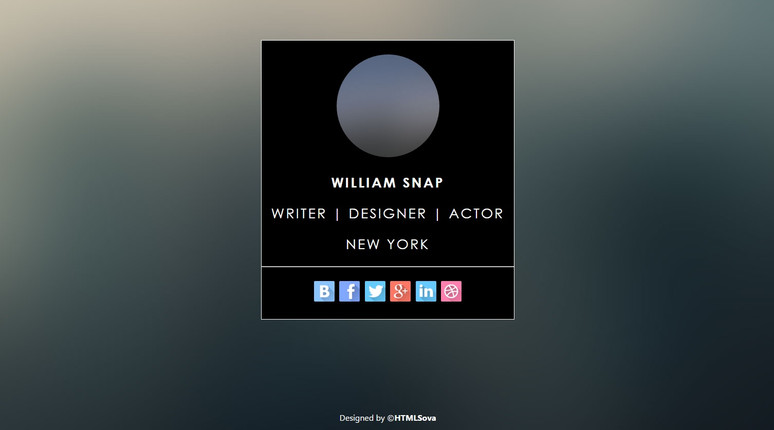 Вид простого сайта-визитки